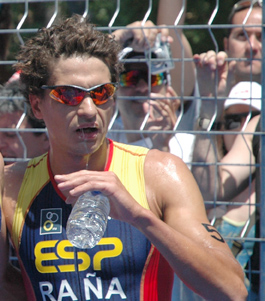 O triatleta Iván Raña, logo de quedar segundo na Copa do Mundo de Madrid'06